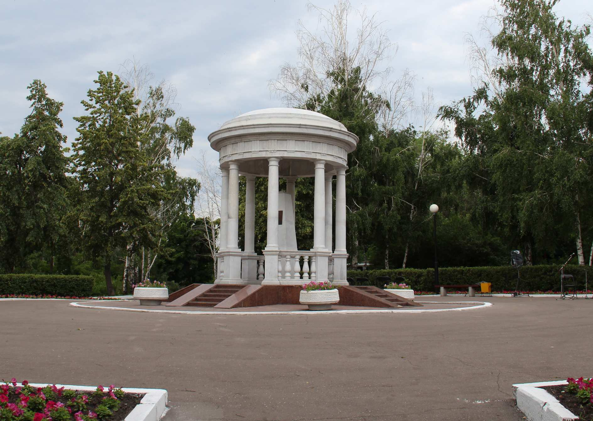 Гончаровская беседка в Винновской роще